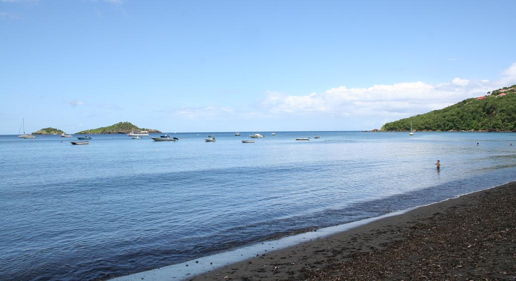 Malendure et îlets Pigeon - Bouillante (Basse-Terre) - Guadeloupe